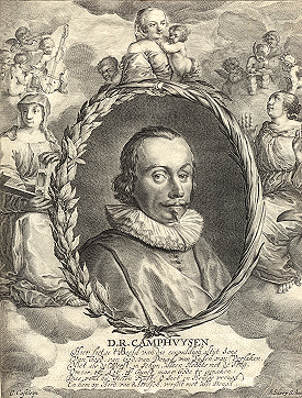 Dirk Rafaelsz. Camphuysen (1586-1627). Gravure.